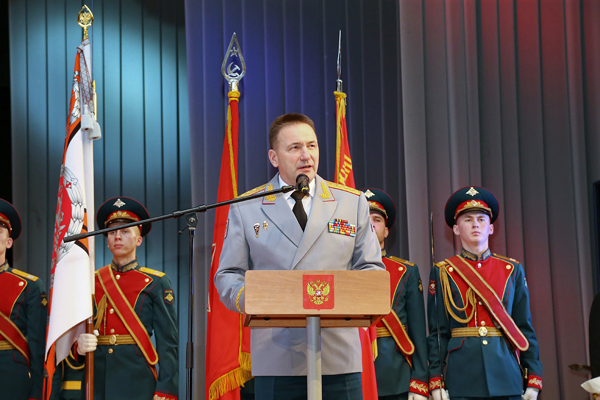 Екатеринбургскому суворовскому училищу - 75-лет